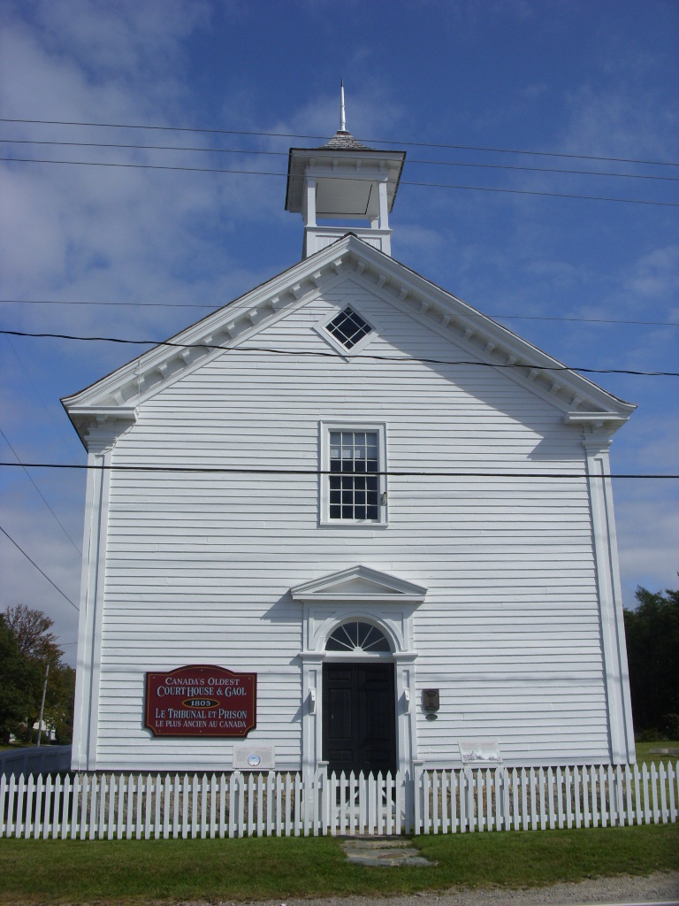 Palais de justice et prison du canton d'Argyle